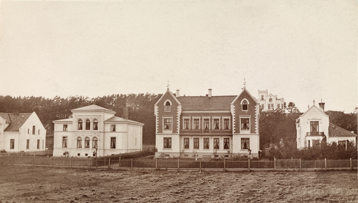 Oscars gate fotografert rundt 1870. Ukjent fotograf, fra Byhistorisk samling hos Oslo Museum.